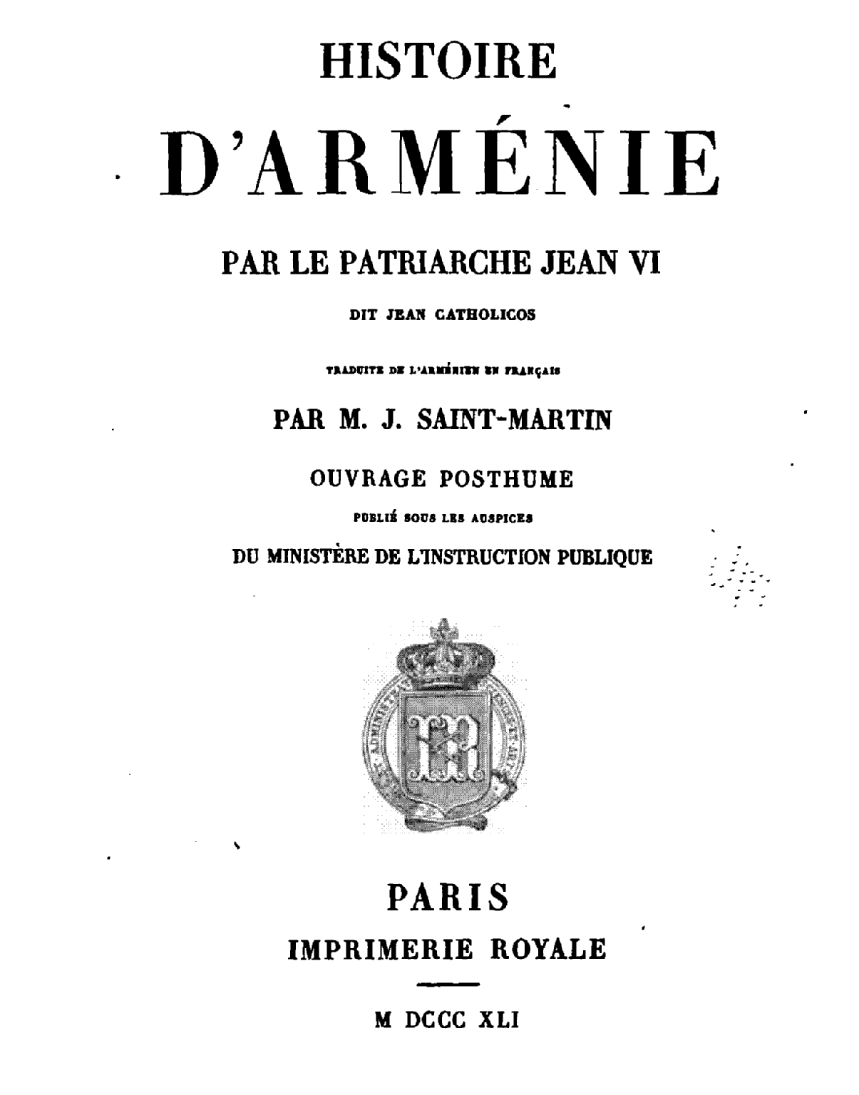 Histoire d'Arménie, par le patriarche Jean VI, dit Jean Catholicos", traduite de l’armenien en français par M. J. Saint-Martin. Paris